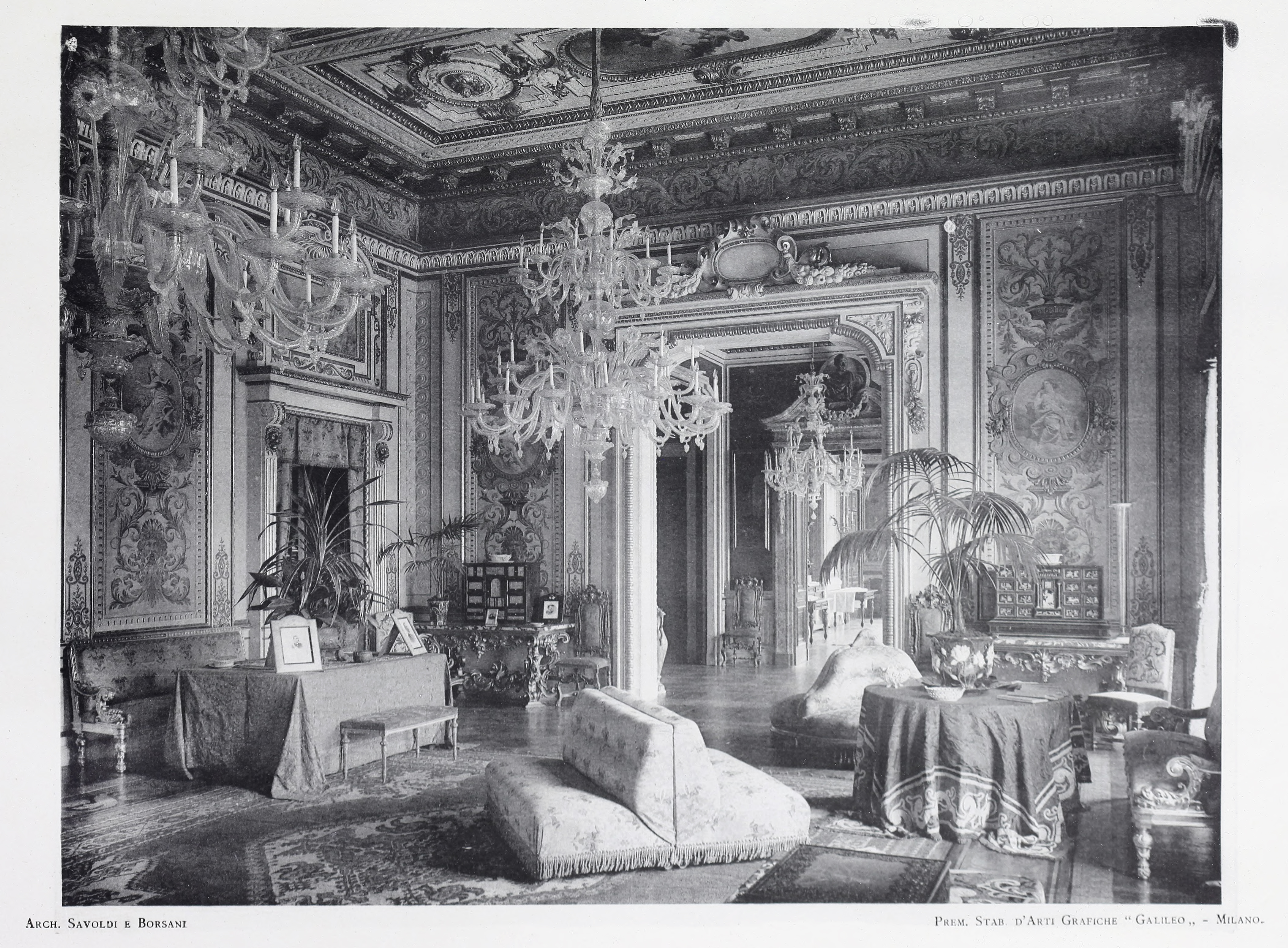 Villa Erba, Cernobbio - veduta dell'Atrio e dello Scalone (1904), da L'Edilizia Moderna